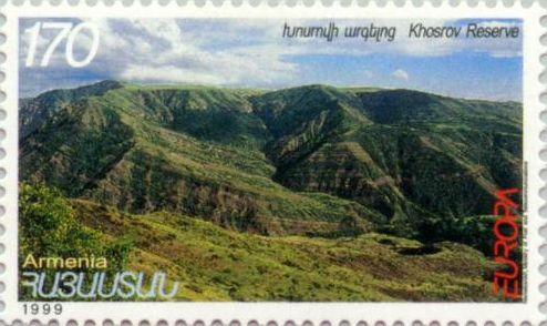 Խոսրովի արգելոցին նվիրված ՀՀ 1999 թվականի փոստային նամականիշ։